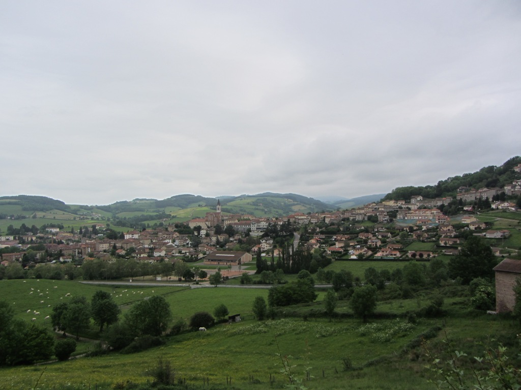 Vue de Bourg-de-Thizy depuis le Bois-Dieu.